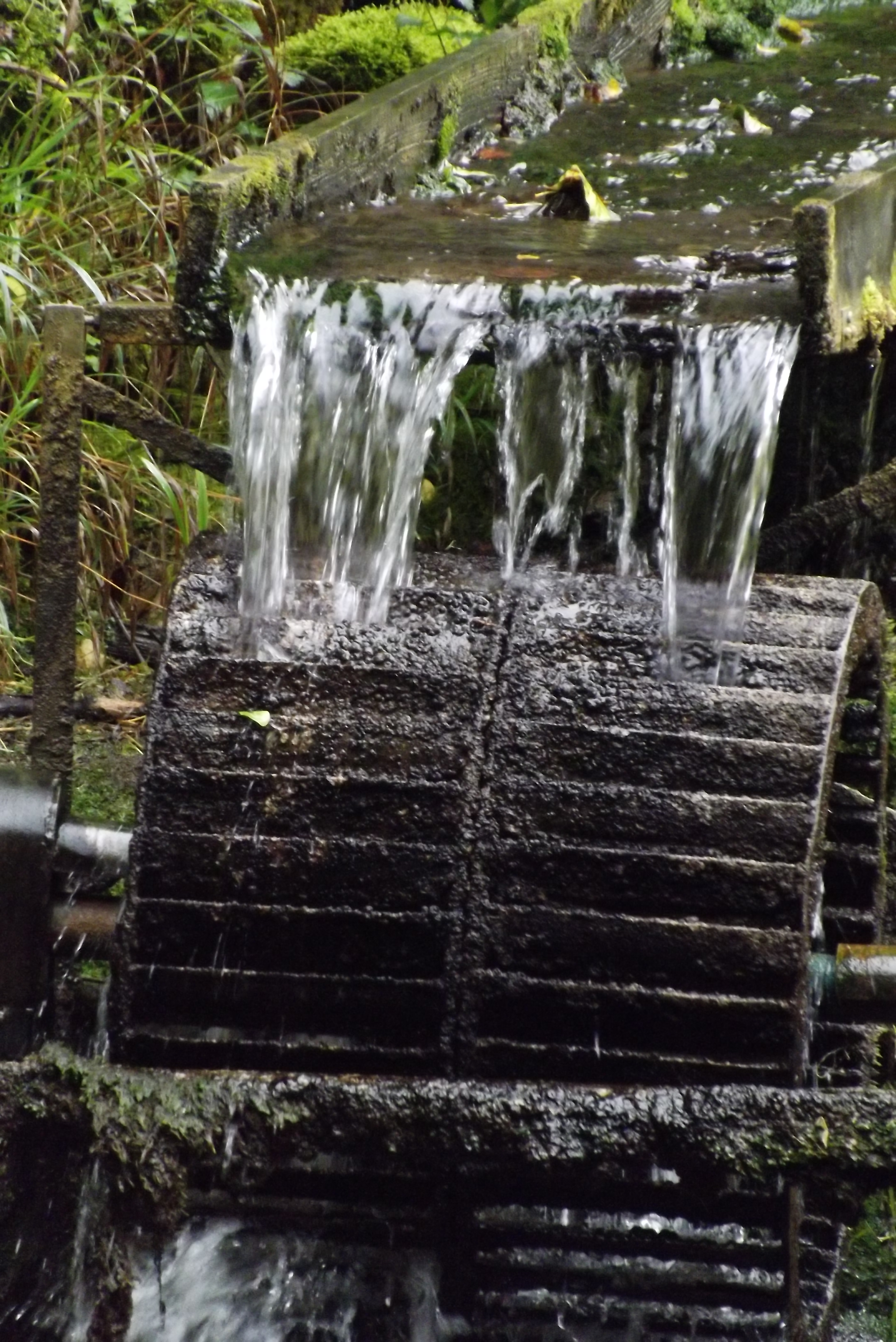 Az egykori vízimalmok emlékére állított vízikerék a Vízfőforrás patakján, Latorpuszta